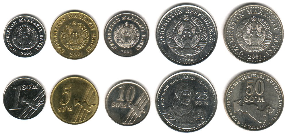 cono monetario uzbeko